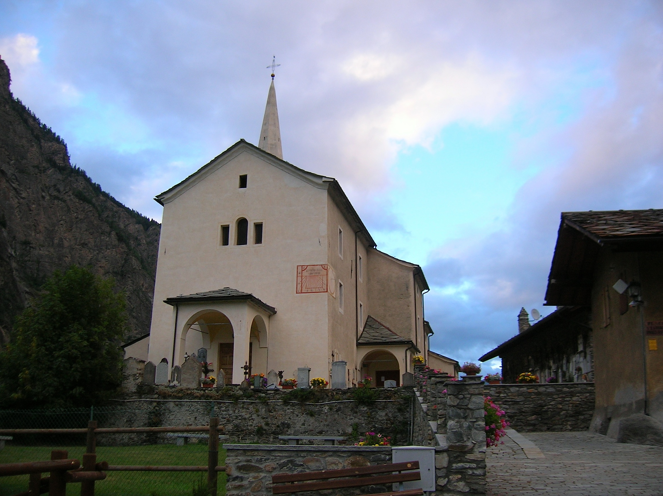 Chiesa parrocchiale di S Giorgio, Rhêmes-Saint-Georges, Valle d'Aosta, Italia.